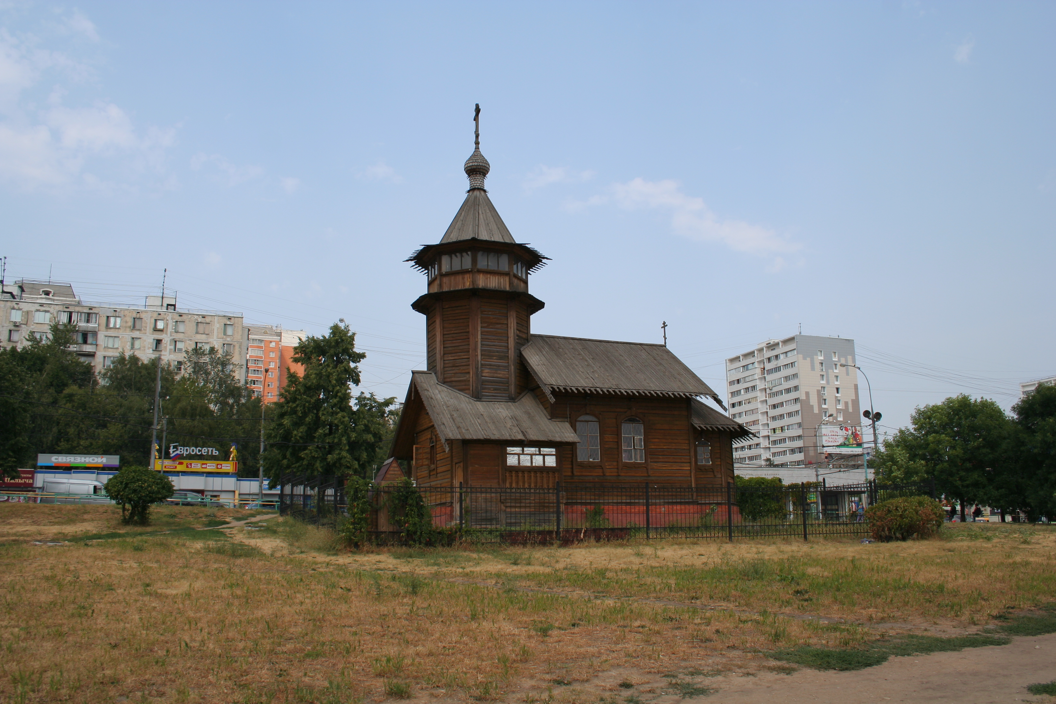 Holzkapelle der Gottesmutter-Ikone „Lindere meinen Kummer“. Stadtteil Nord-Medwedkowo, Moskau.